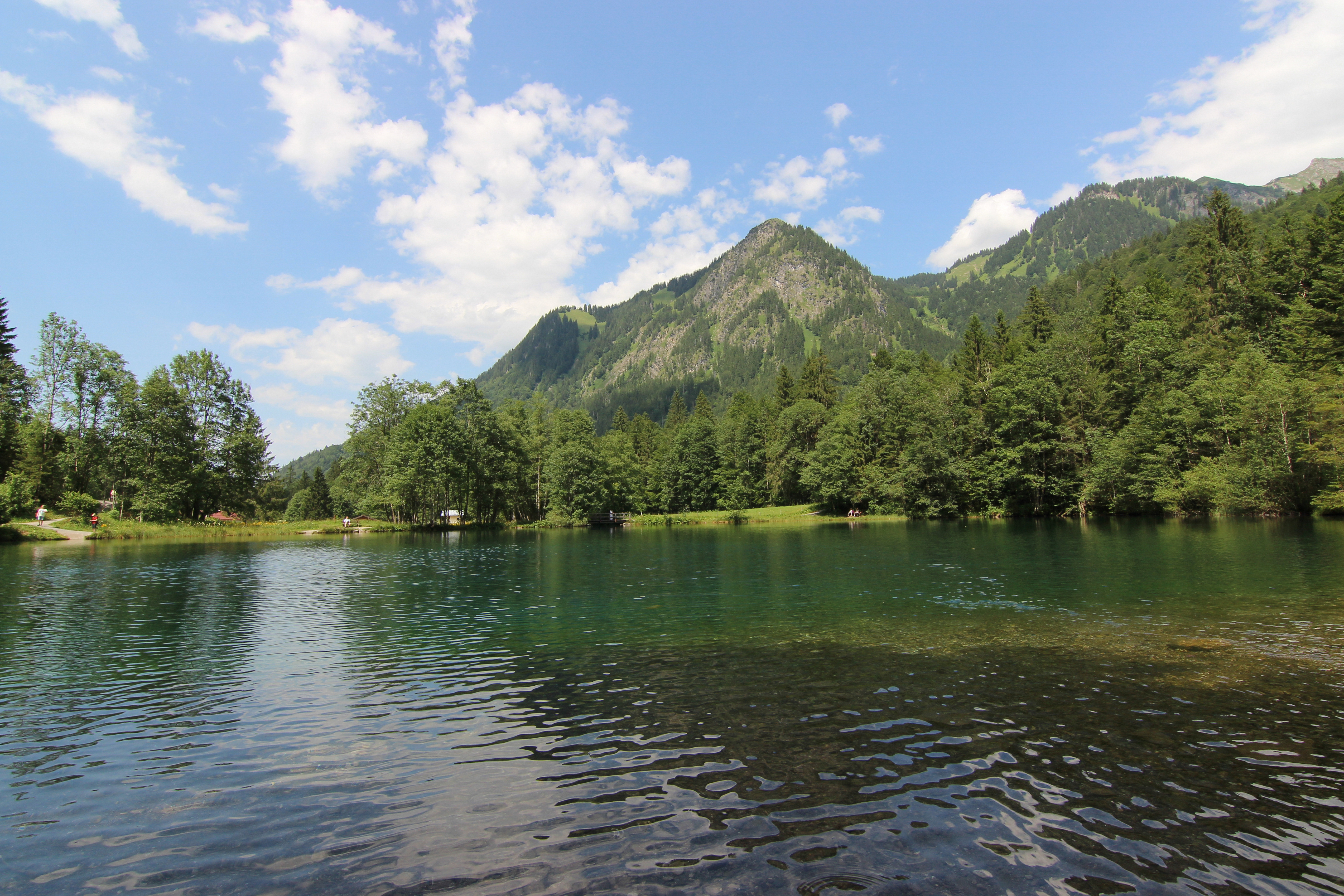 Christlessee bei Oberstdorf (Gebirgssee mit Karstquellen)